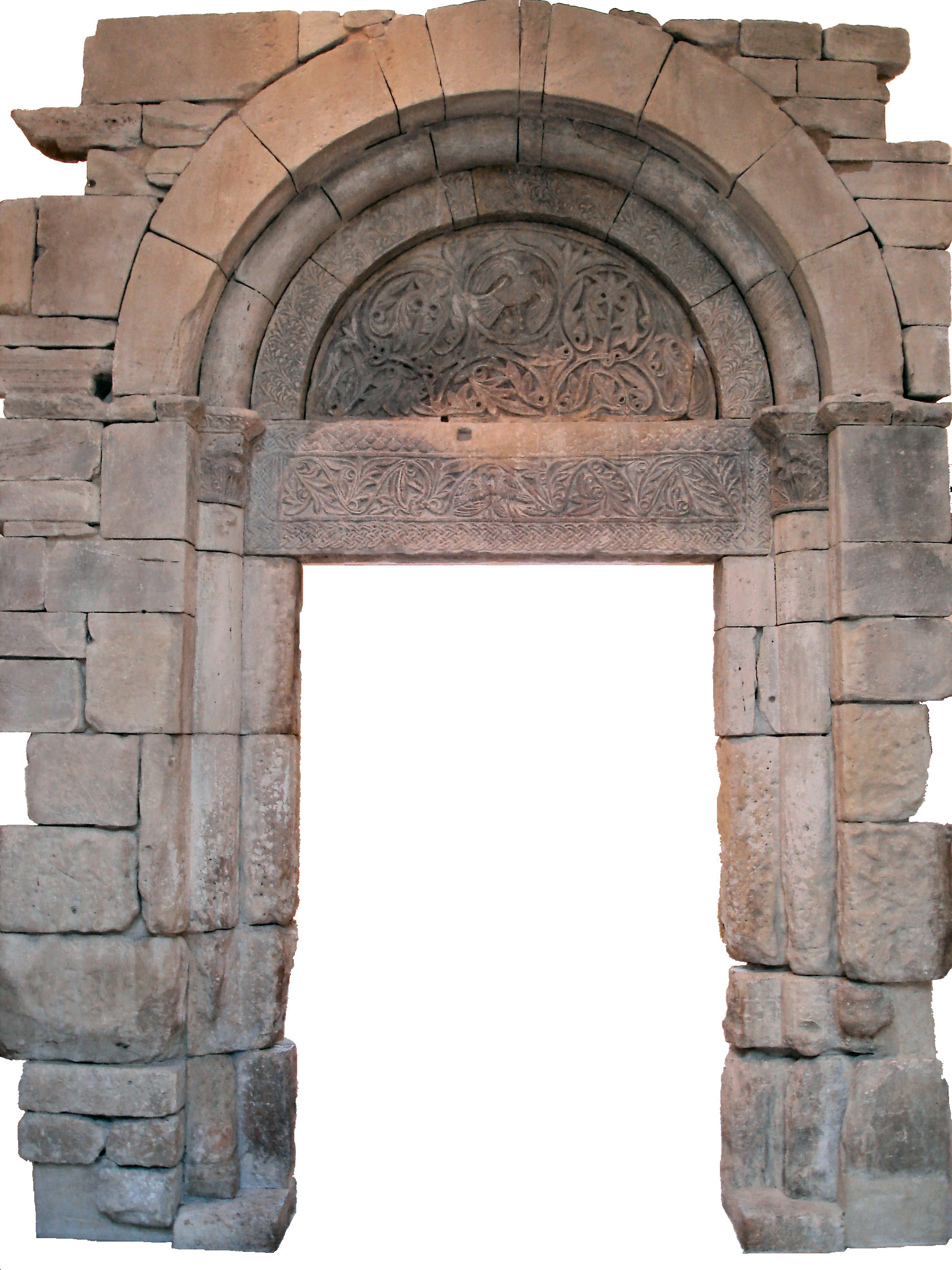 Languedoc, premier quart du XIIe siècle Porte décorée de rinceaux de feuillage, d'oiseaux, de palmettes et d'entrelacs Provenant du côté sud de la nef du prieuré Sainte-Cécile-d'Estagel (commune de Saint-Gilles-du-Gard, Gard) Calcaire gréseux Acquis en 1932